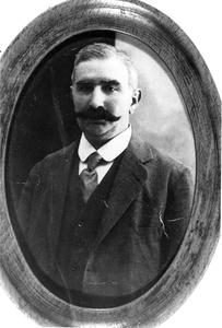 Георгиос Пендзикис